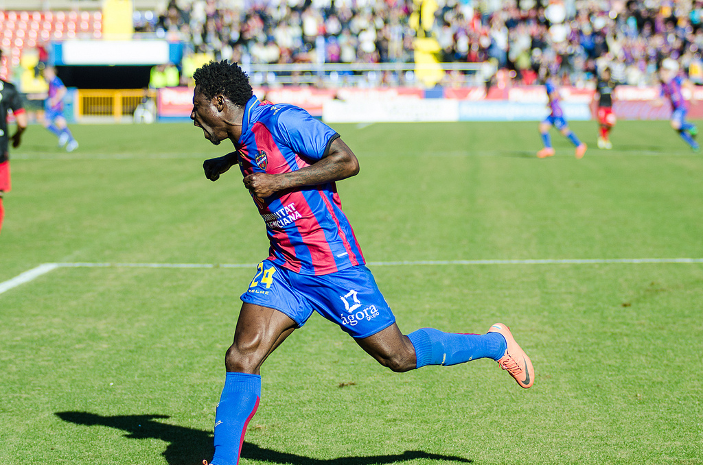 Martins celebra un gol en el partit contra el RCD Mallorca, desembre 2012.